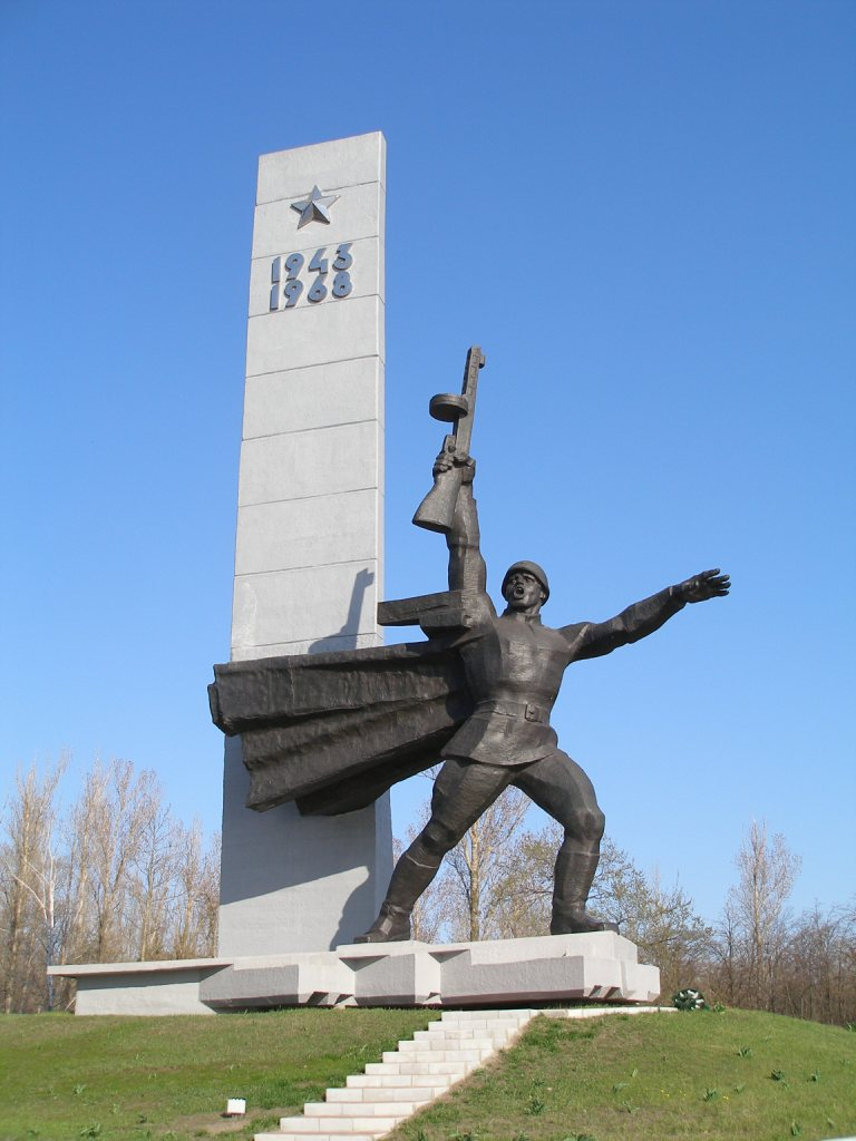 Пам`ятне місце форсування р. Дніпра радянськими військами, Запоріжжя, вул. Чубанова, 6